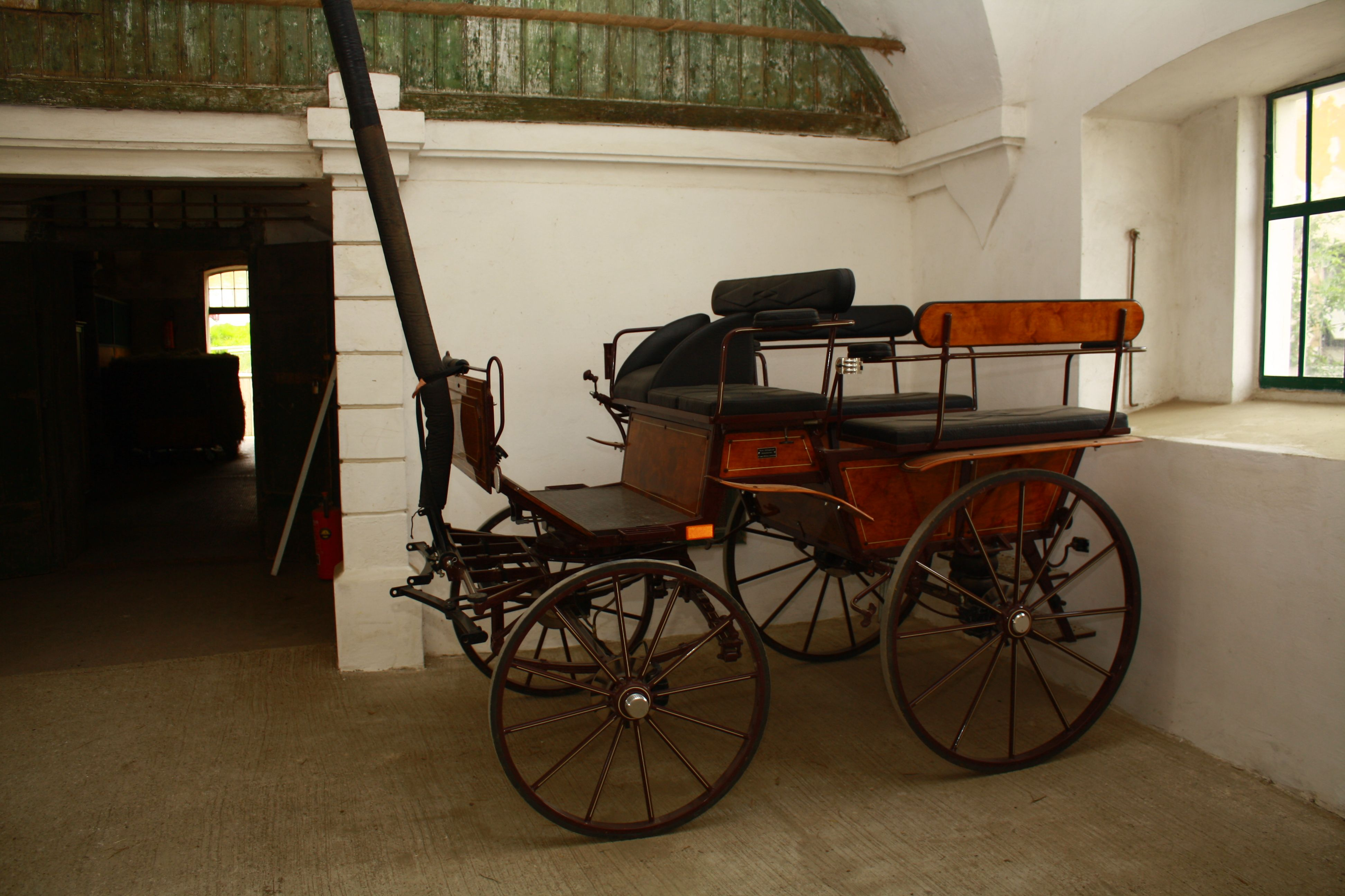 Kutsche auf Schloss Hof in Niederösterreich